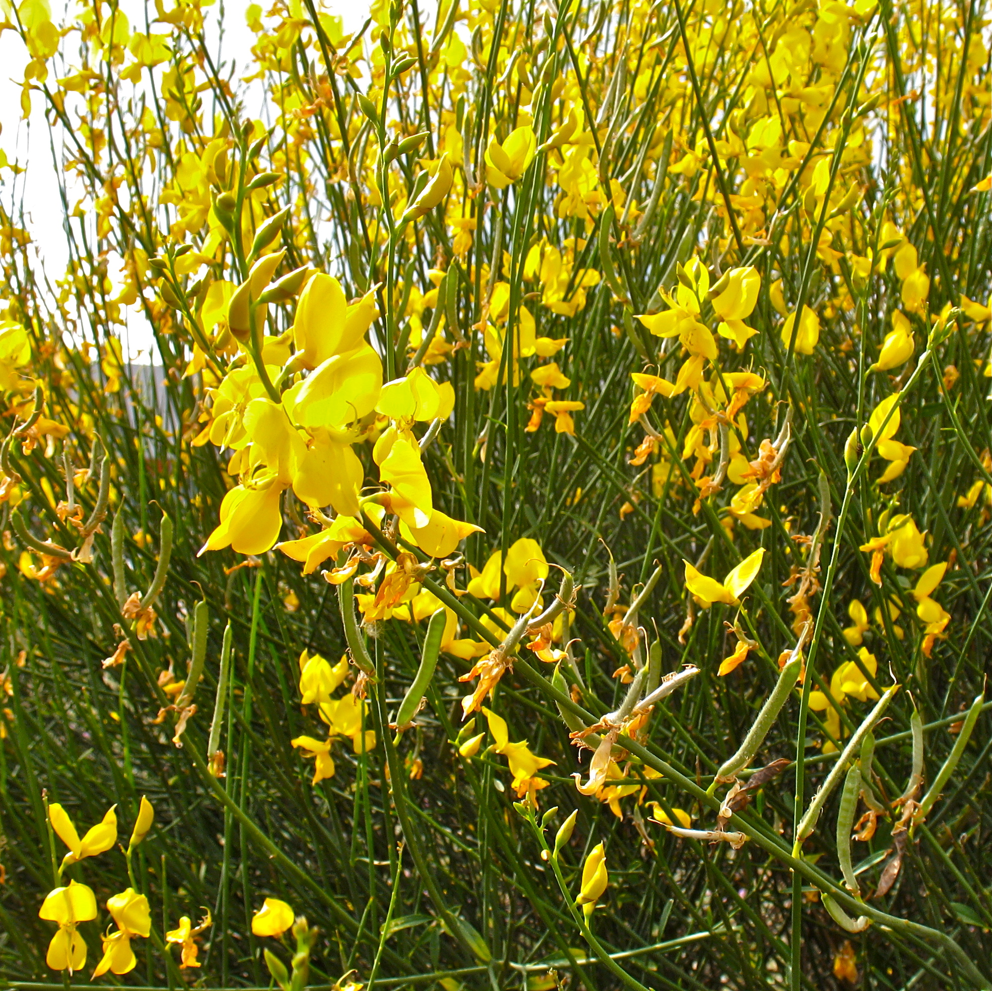 Spartium junceum, Colmenar Viejo, Madrid, Spain.